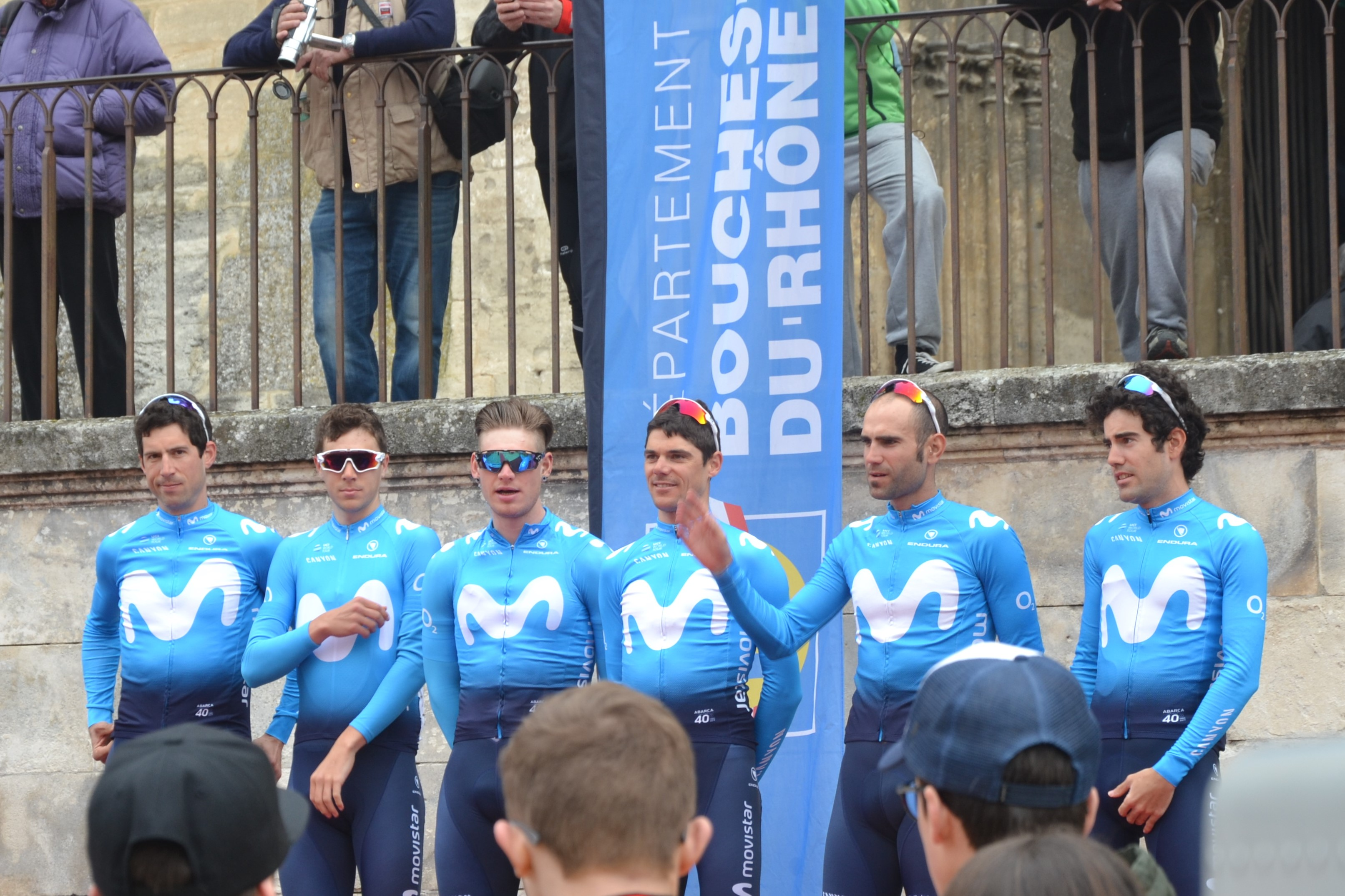 Lors du podium des signatures avant départ de l'étape